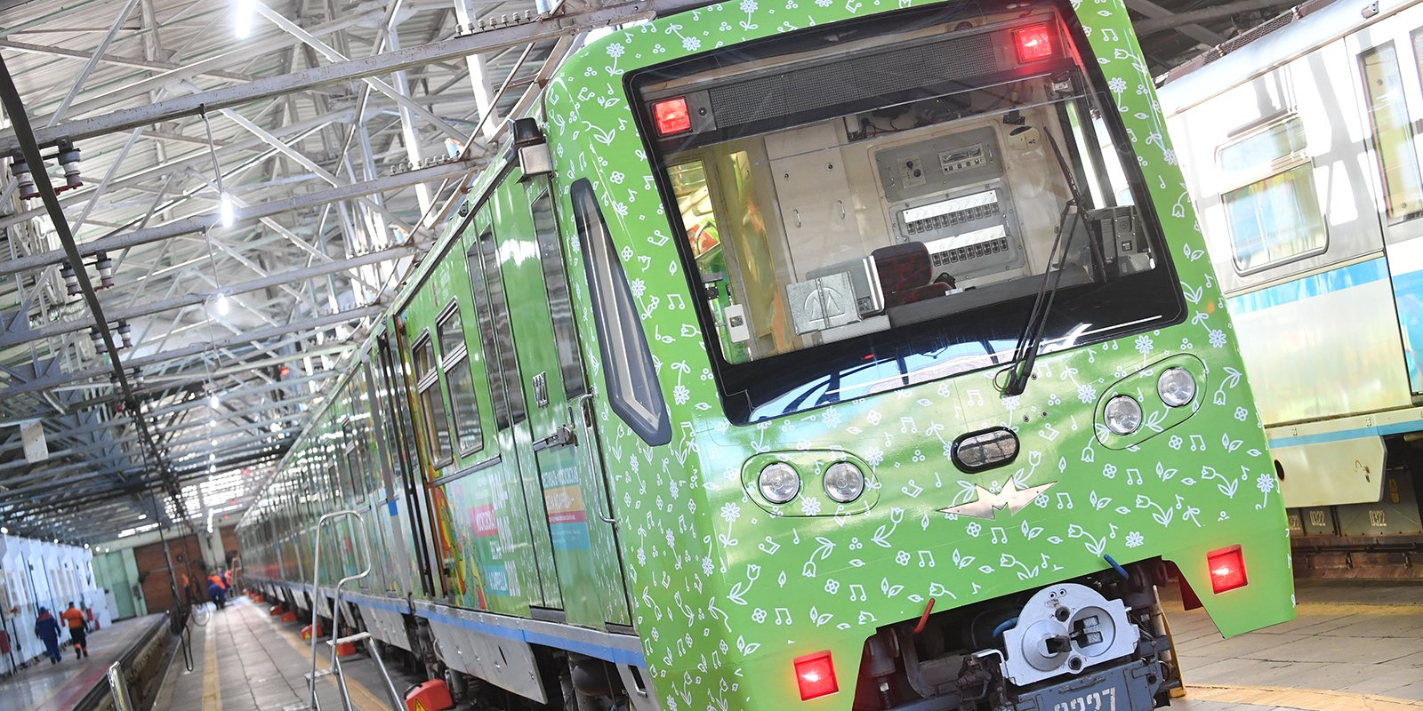 Поезд в депо